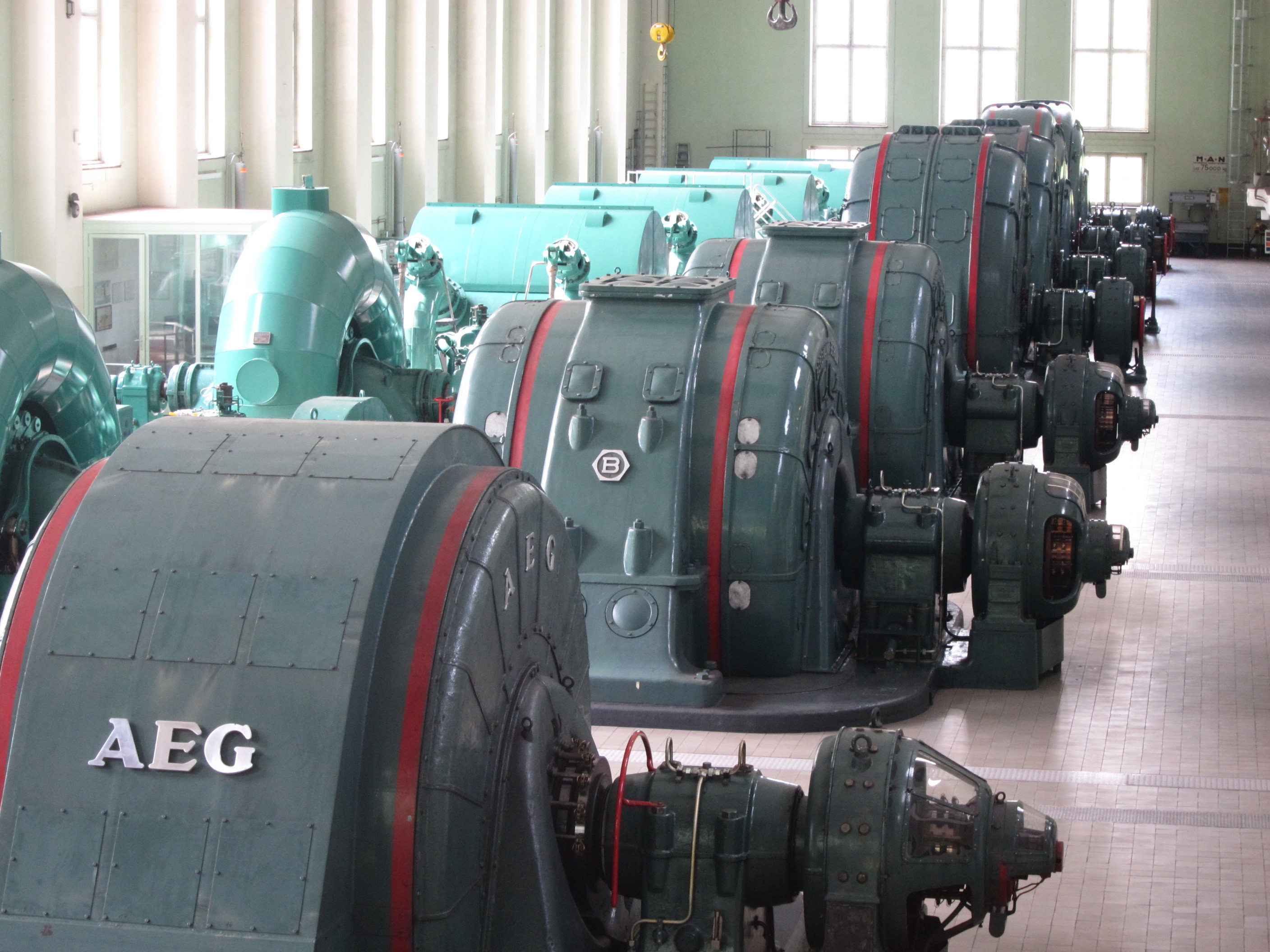 Walchenseekraftwerk, sieben der acht Generatoren (je zwei von einem Hersteller); hinten links die vier Pelton-Turbinensätze